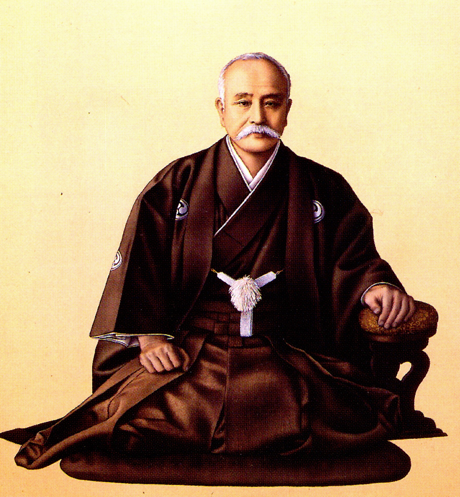 岡部長職の肖像。